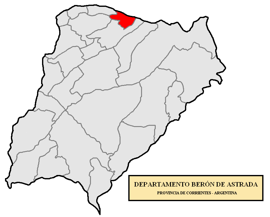 Ubicación de Berón de Astrada Localización del Departamento de Berón de Astrada, en la provincia de Corrientes, Argentina.